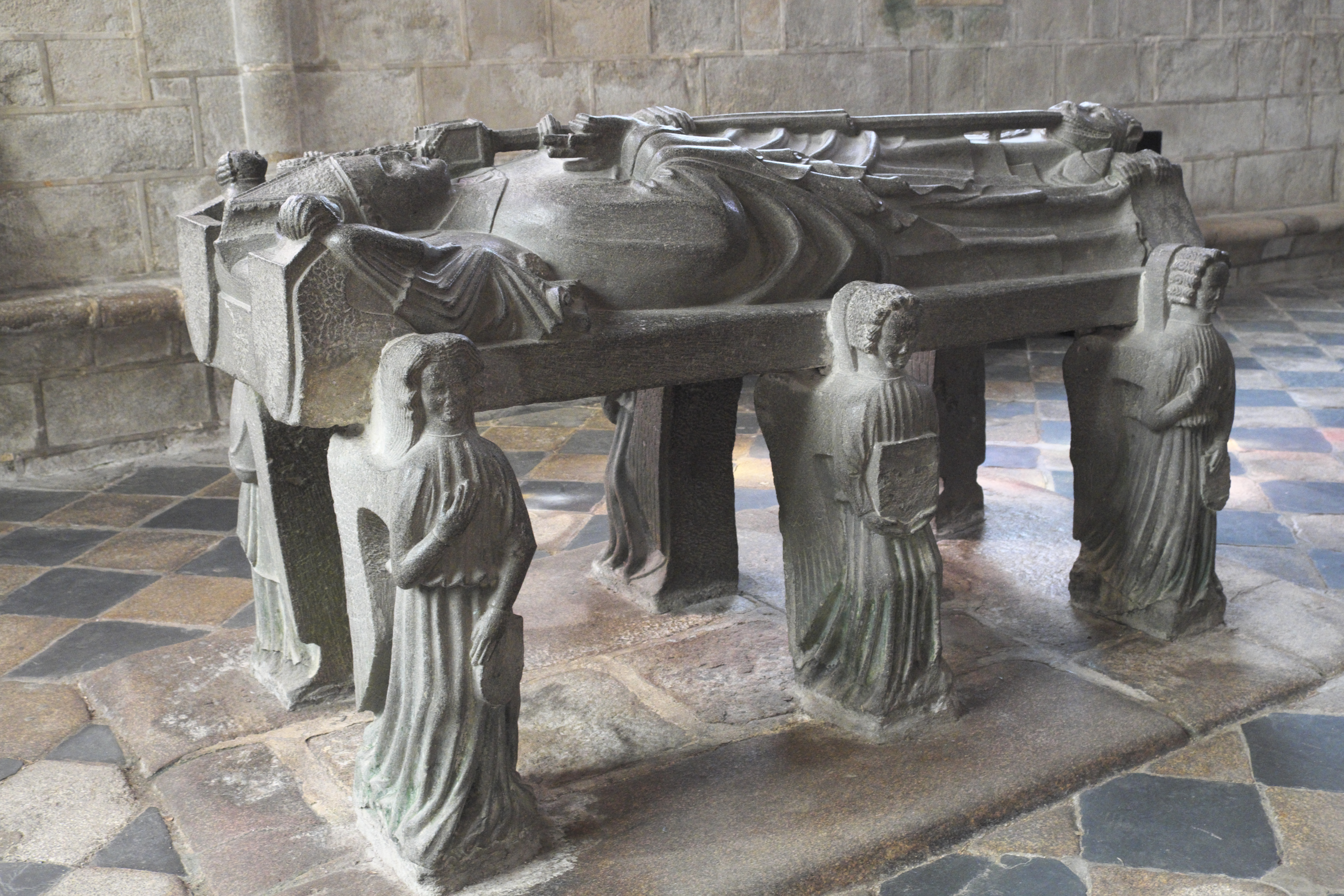 Katholische Kirche Saint-Ronan in Locronan im Département Finistère (Region Bretagne/Frankreich), Grab des heiligen Ronan